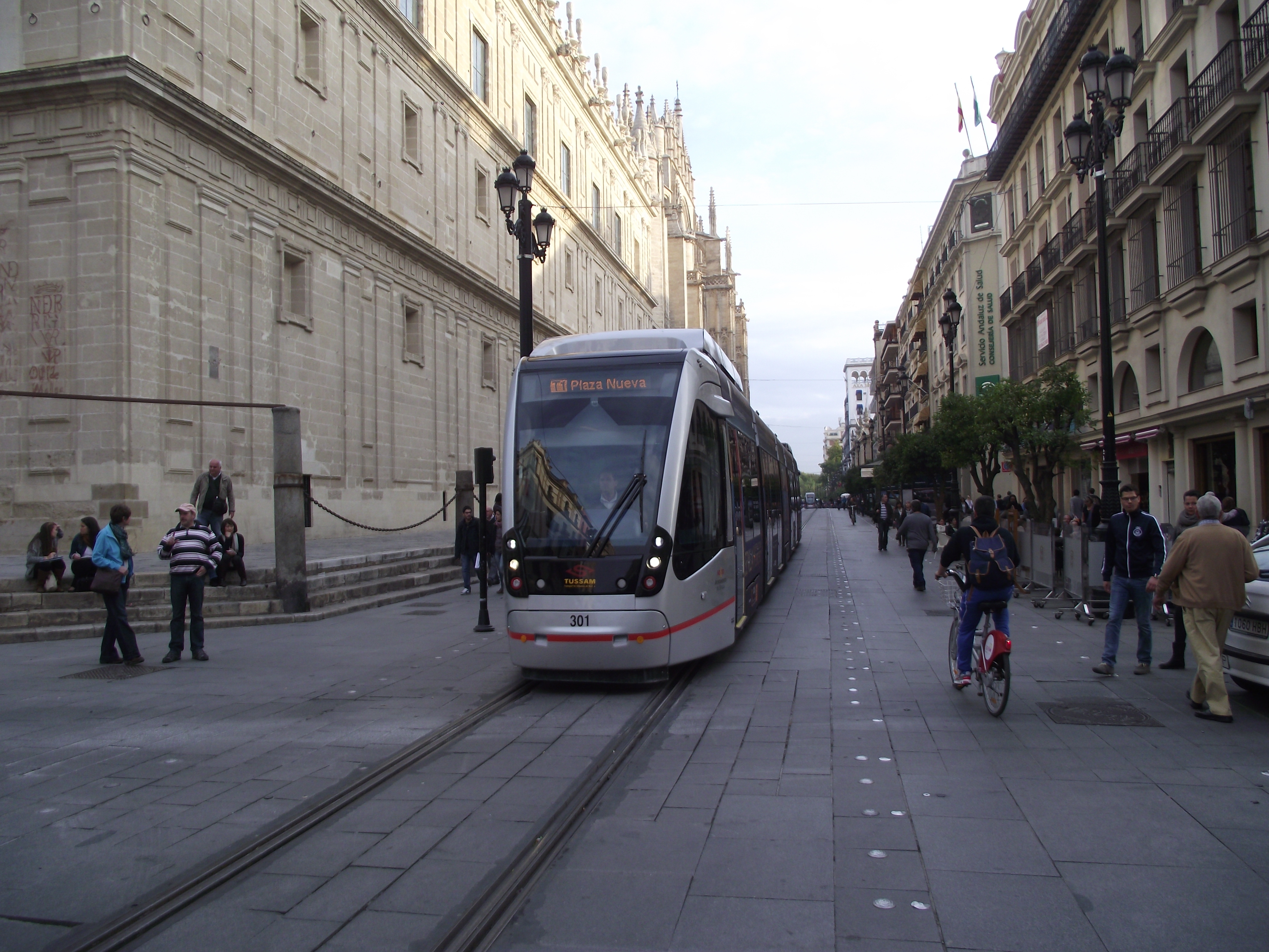 Tram in de Avenida de la Constitución. Een stuk enkelspoor en zonder bovenleiding.